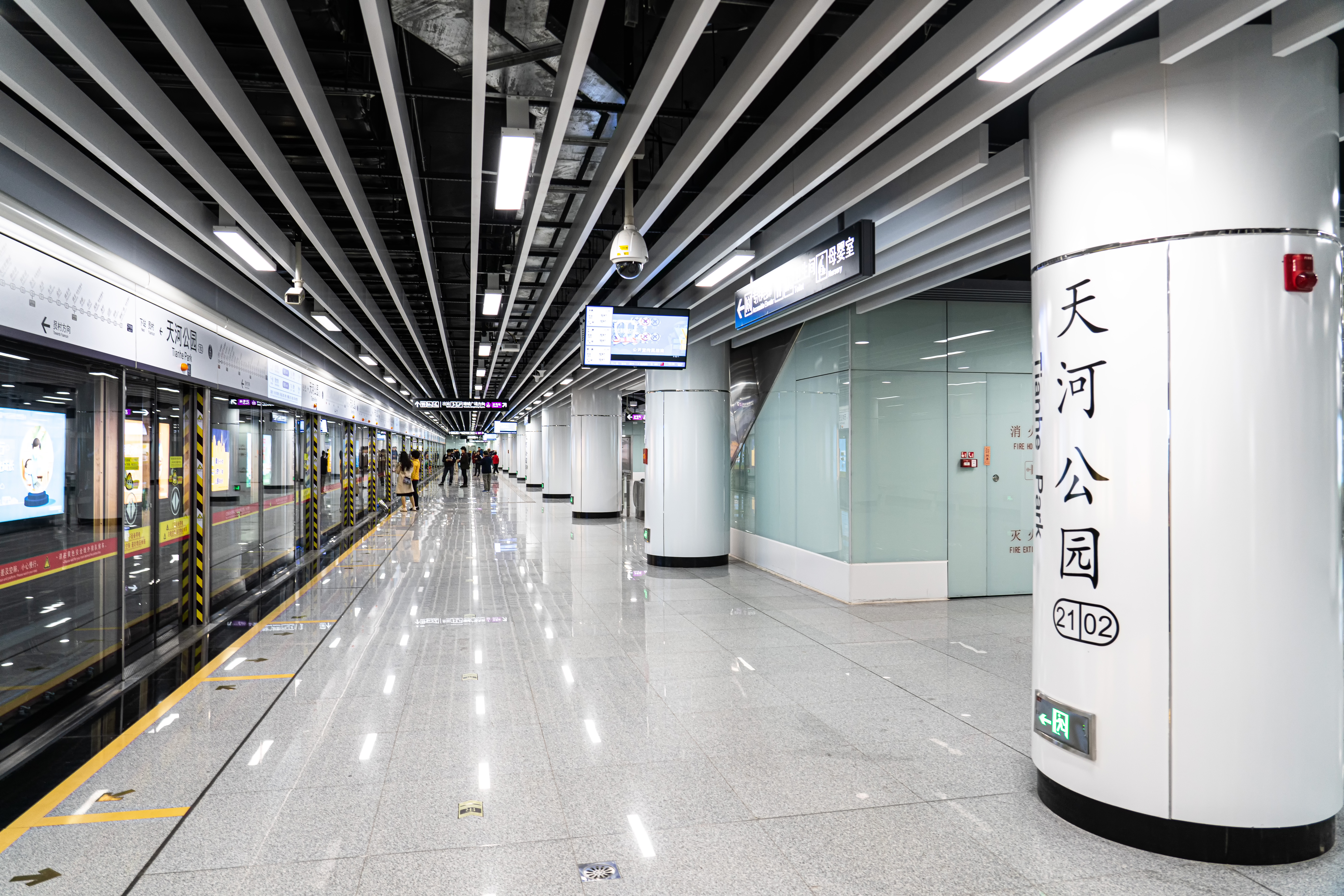 广州地铁天河公园站2号月台